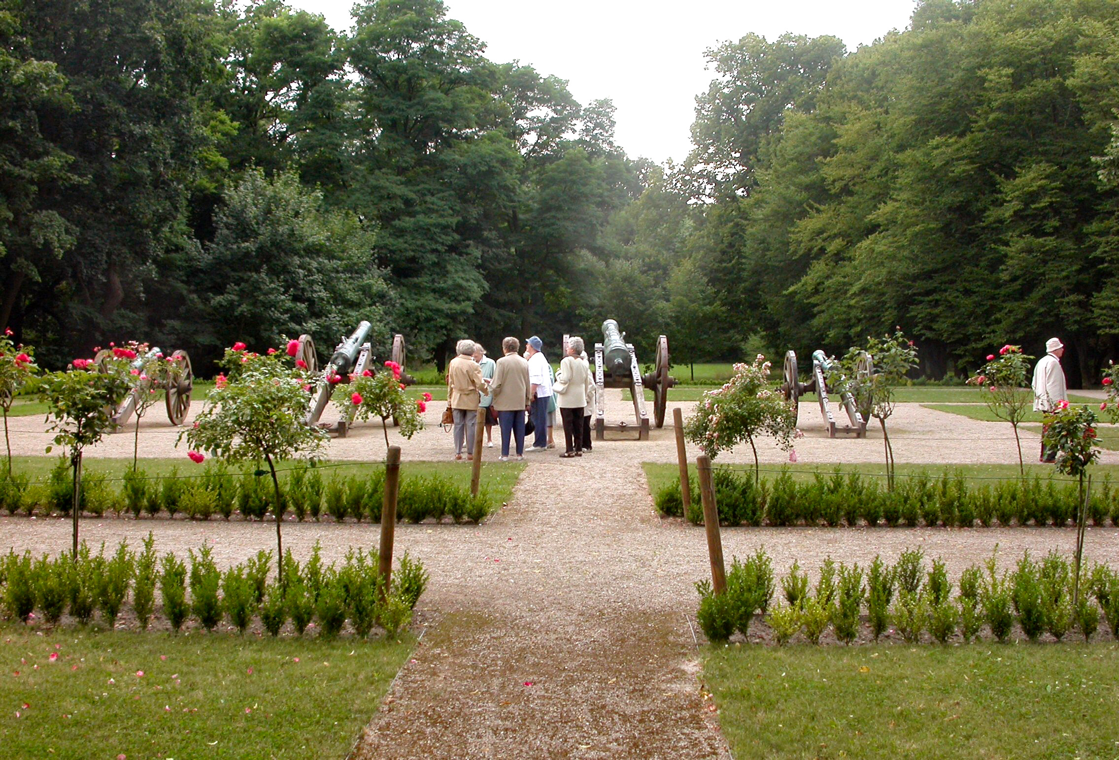 Suiomh Schloss Schonhausen